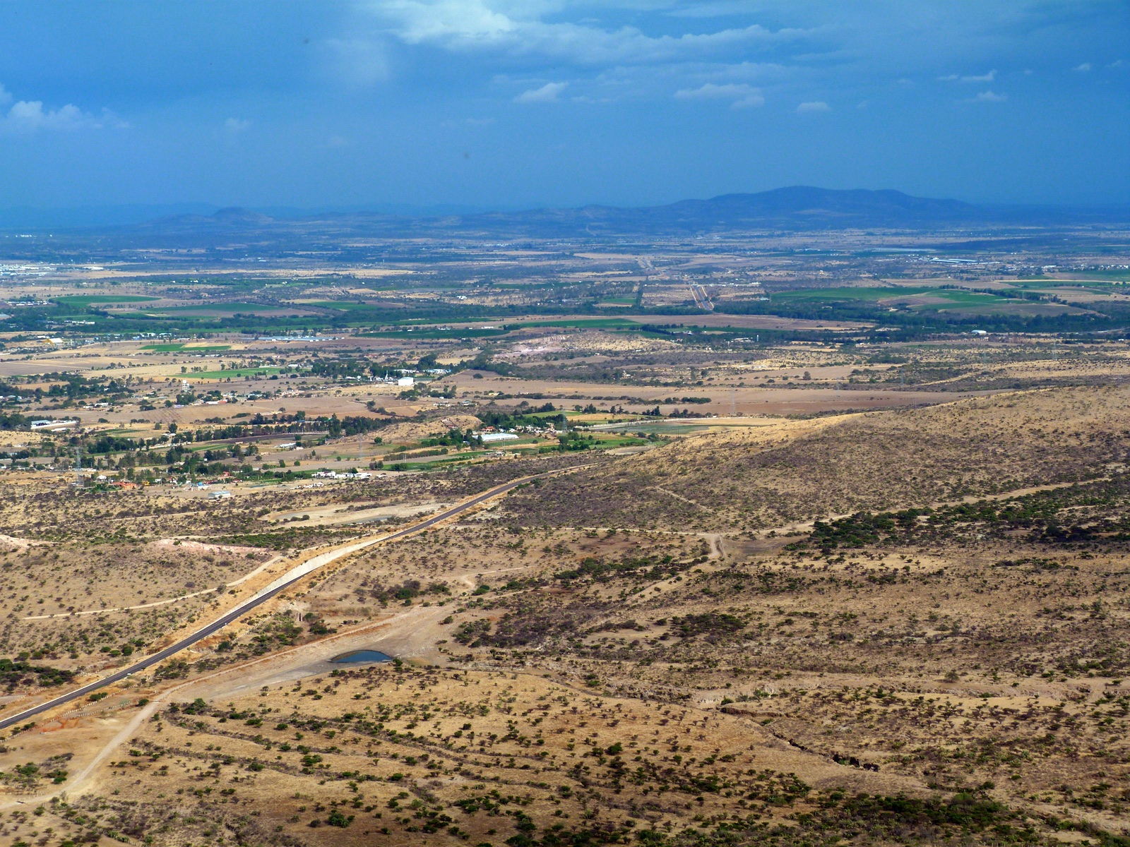 Vista desde el picacho hacia los gallos